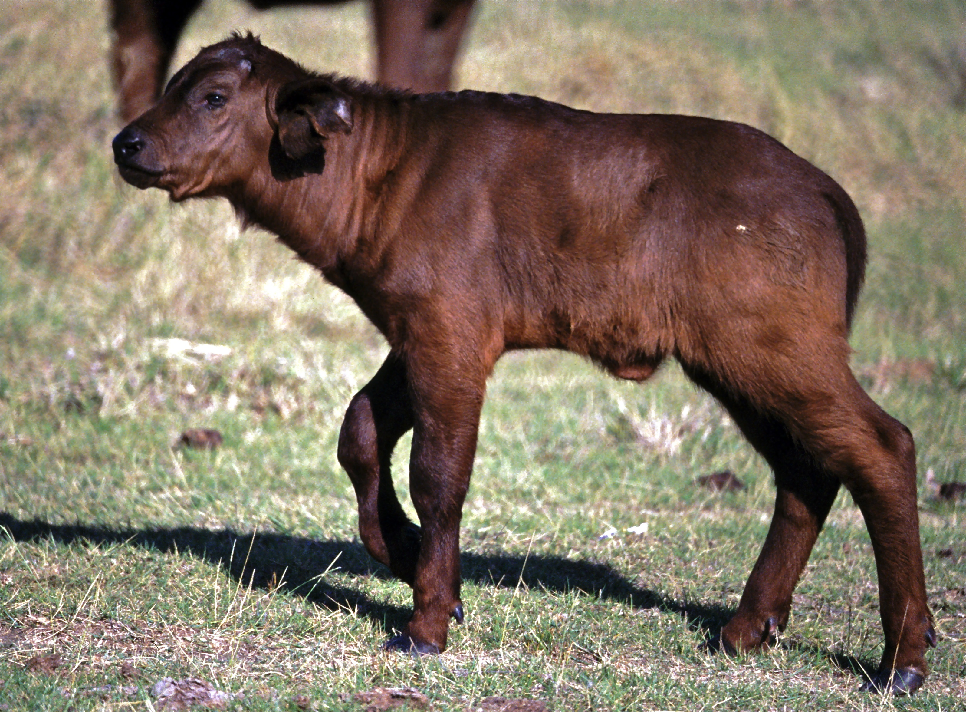 Lake Nakuru NP, KENYA Scanned slide from 2004